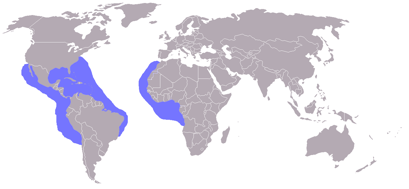 Verbreitungskarte des Zitronenhais (Negaprion brevirostris) Quelle: selbst angefertigt